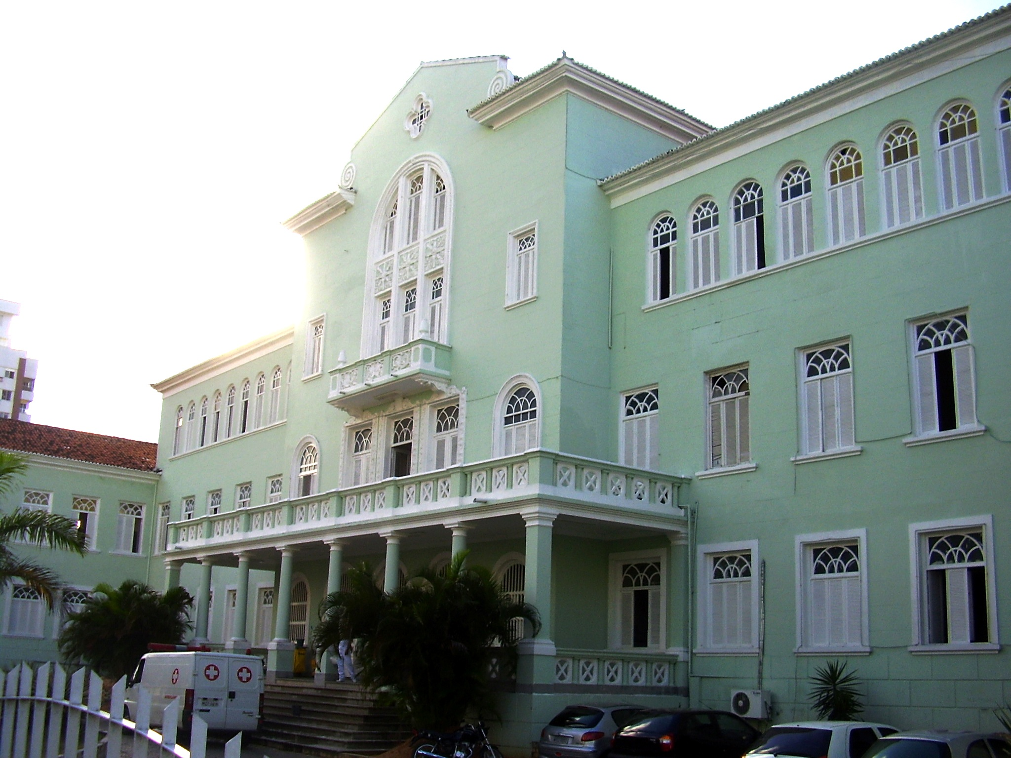 Maternidade Januário Cicco - Hospital especializado em obstetrícia, pertencente à UFRN, Universidade Federal do Rio Grande do Norte. Localiza-se em Natal-RN